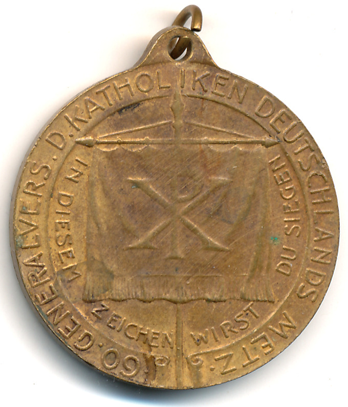 Médaille de pélerinage, Metz 1913, rappelant l'édit de Milan, revers